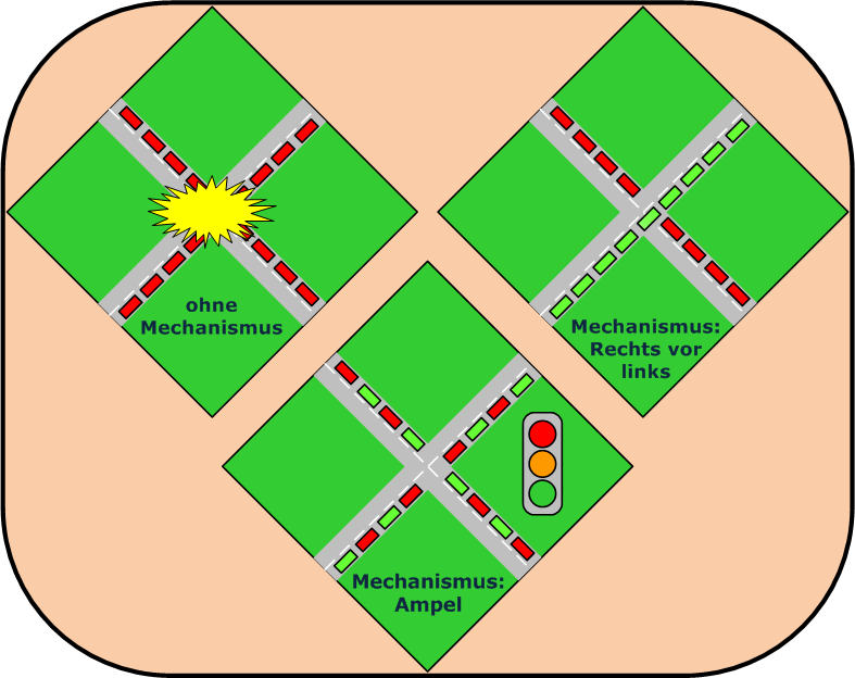 Die Abbildung stellt schematisch die Anwendung der Mechanismus-Design-Theorie am Beispiel der Verkehrsführung dar.